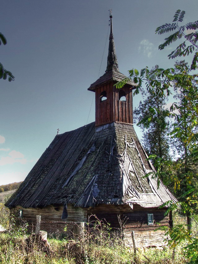 Biserica de lemn din Sava (Biserici de lemn din Cluj)